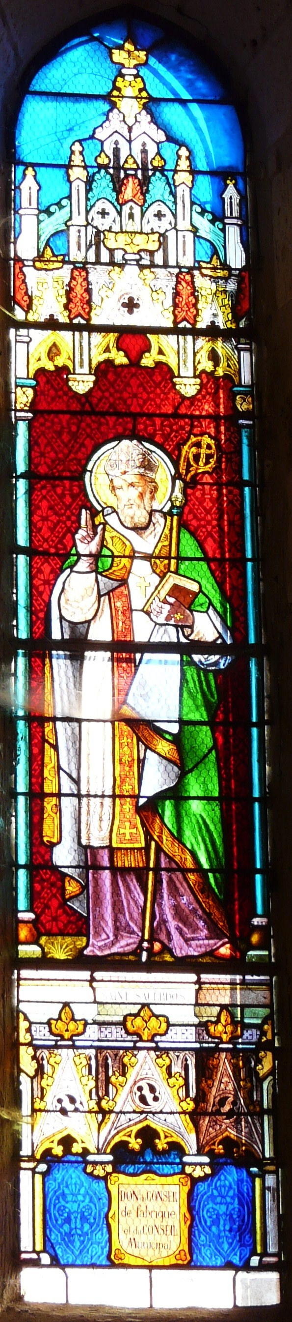 Vitrail représentant saint Sacerdos, chœur de l'église Saint-Jean-Baptiste, Fonroque, Dordogne, France.